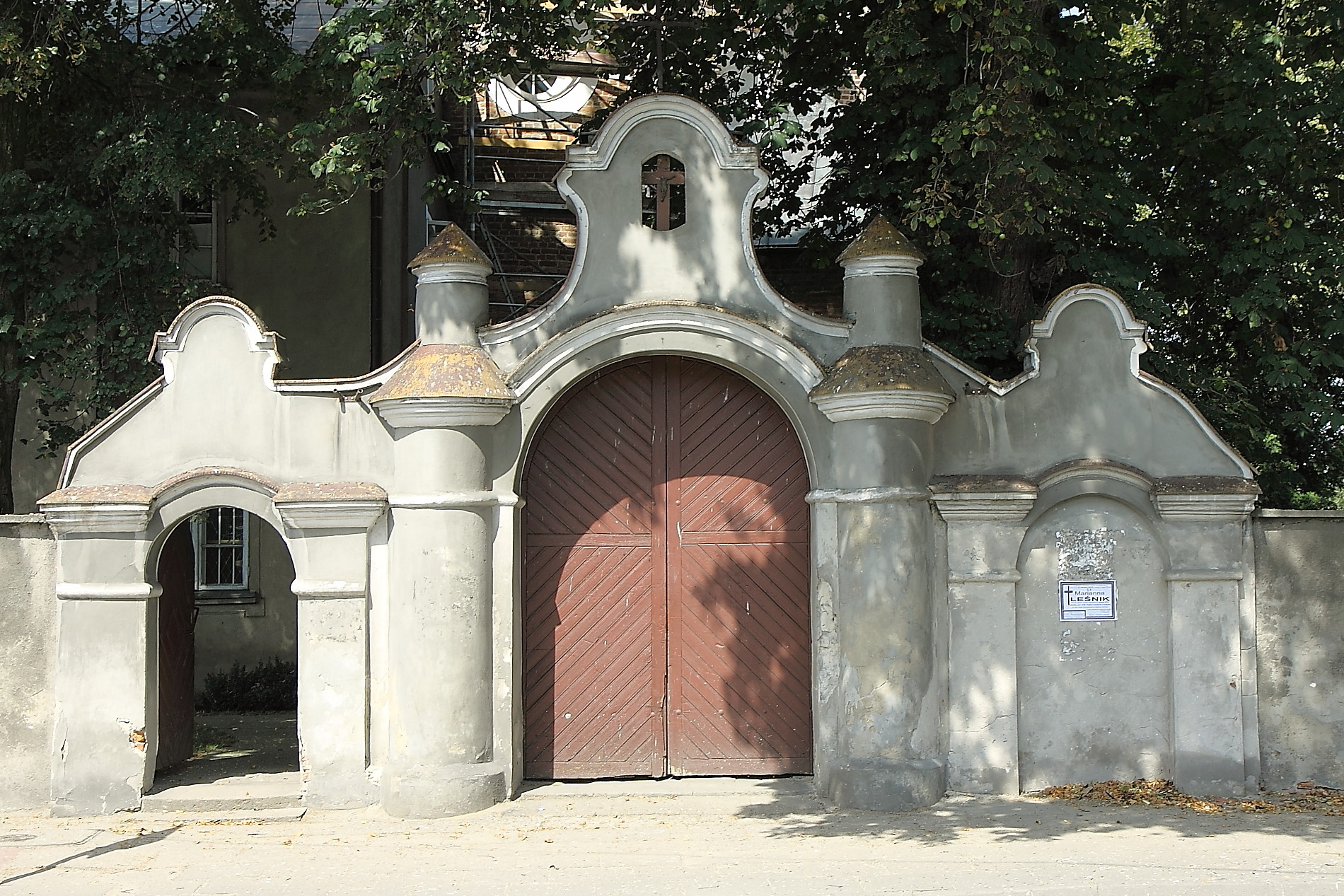 wpisano do rejestru zabytków woj. łódzkiego pod nr 105/879